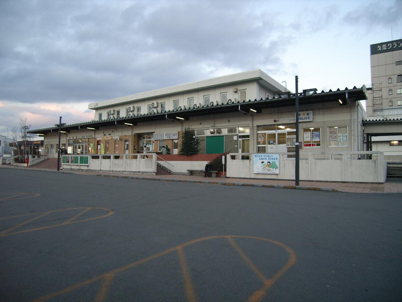 Kuji Station, Kuji, Iwate, Japan